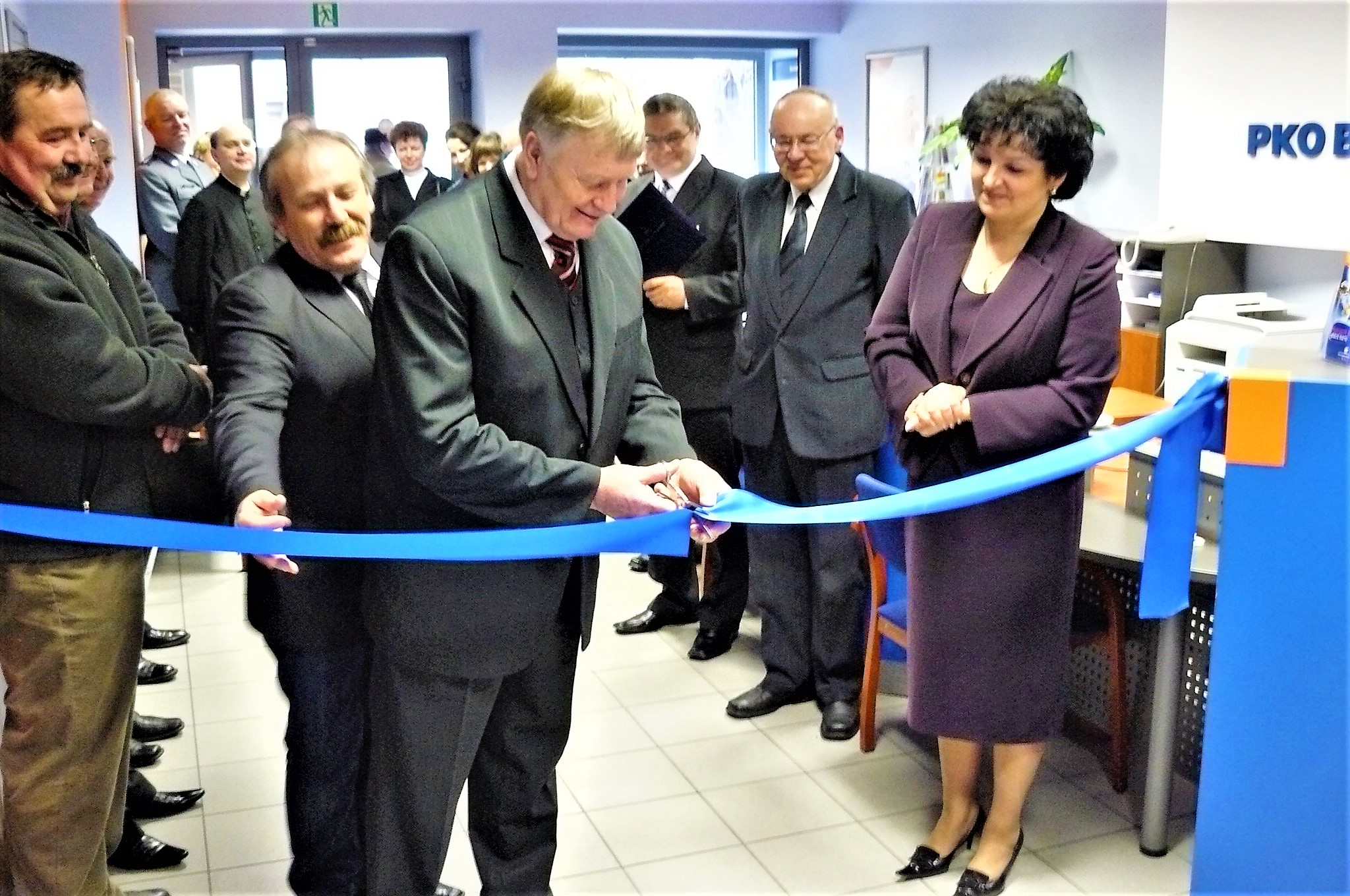 Jerzy Kepel otwiera oddział PKO BP w Czempiniu w 2010.